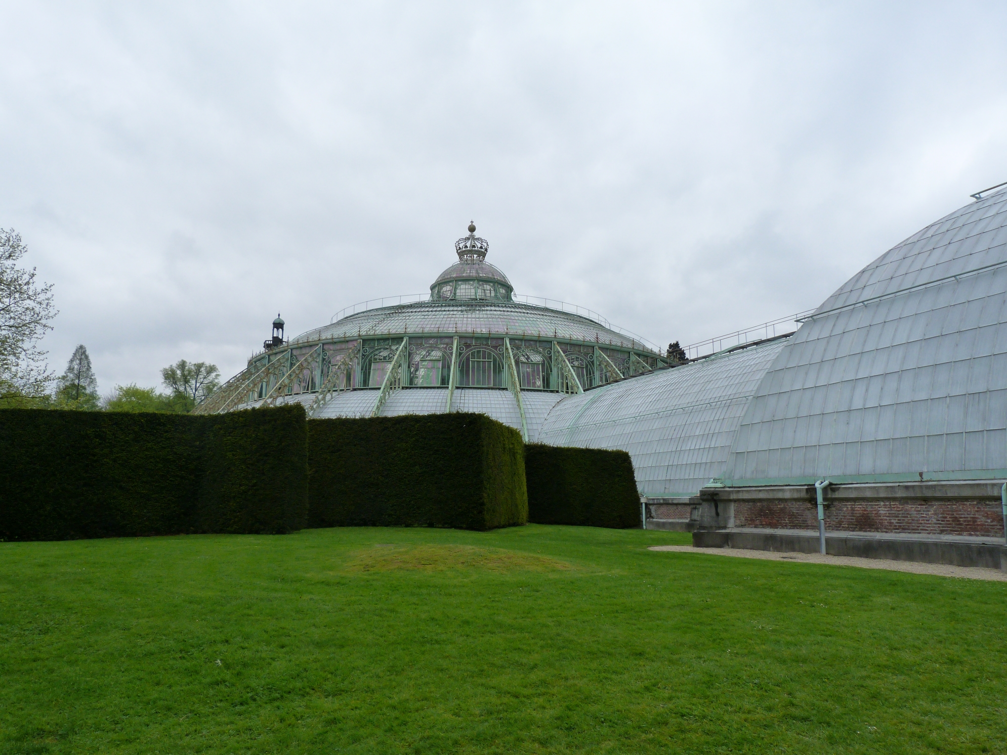 Tuin bij het paleis van Laken, Koninklijke Serres